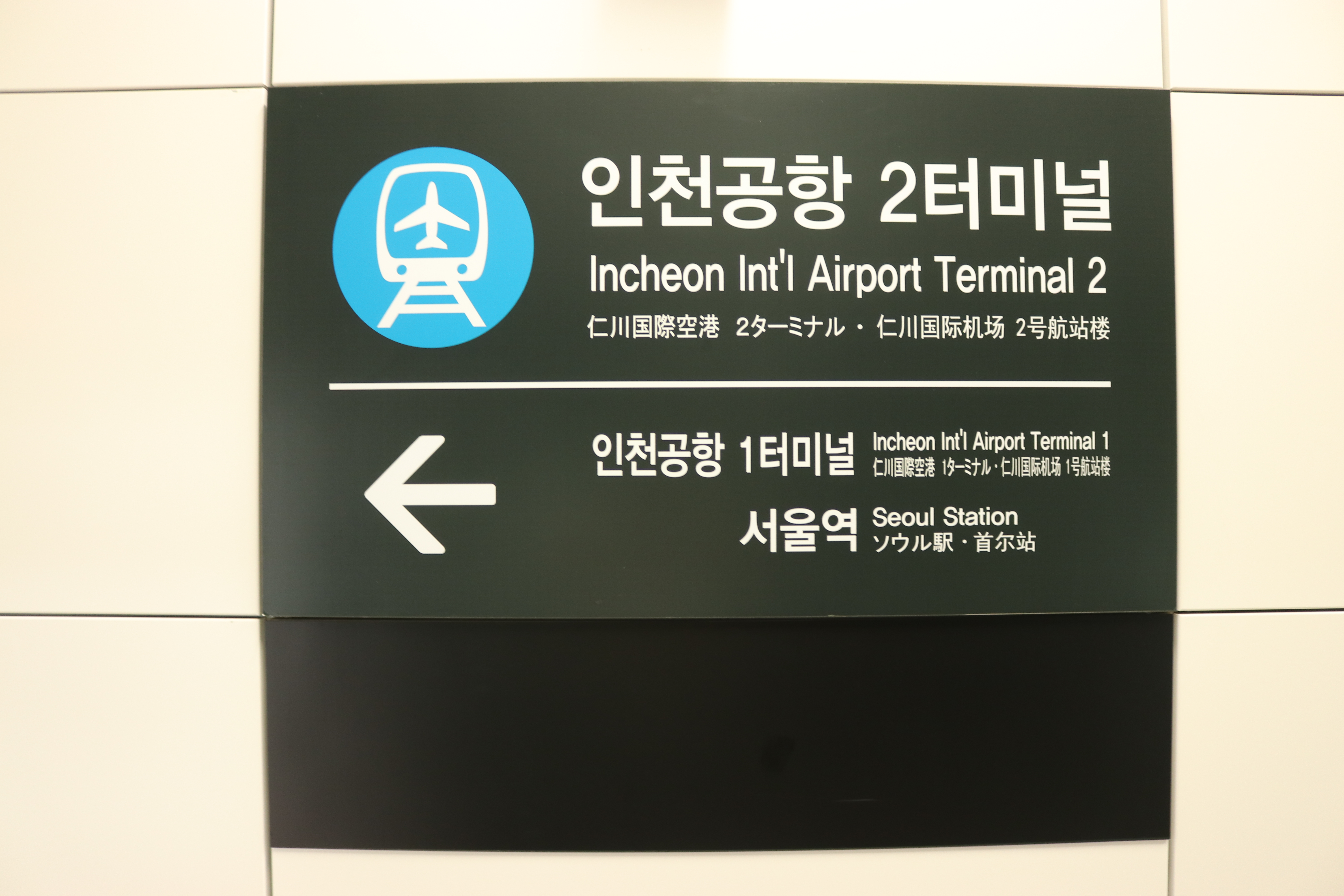 인천공항 2터미널역 역명판